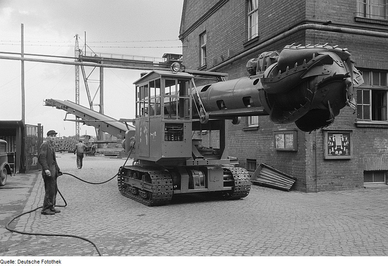 Original image description from the Deutsche Fotothek Ein Kugelschaufler der Firma Bleichert, daran angeschlossen ein Stromkabel, gehalten von einem Mann